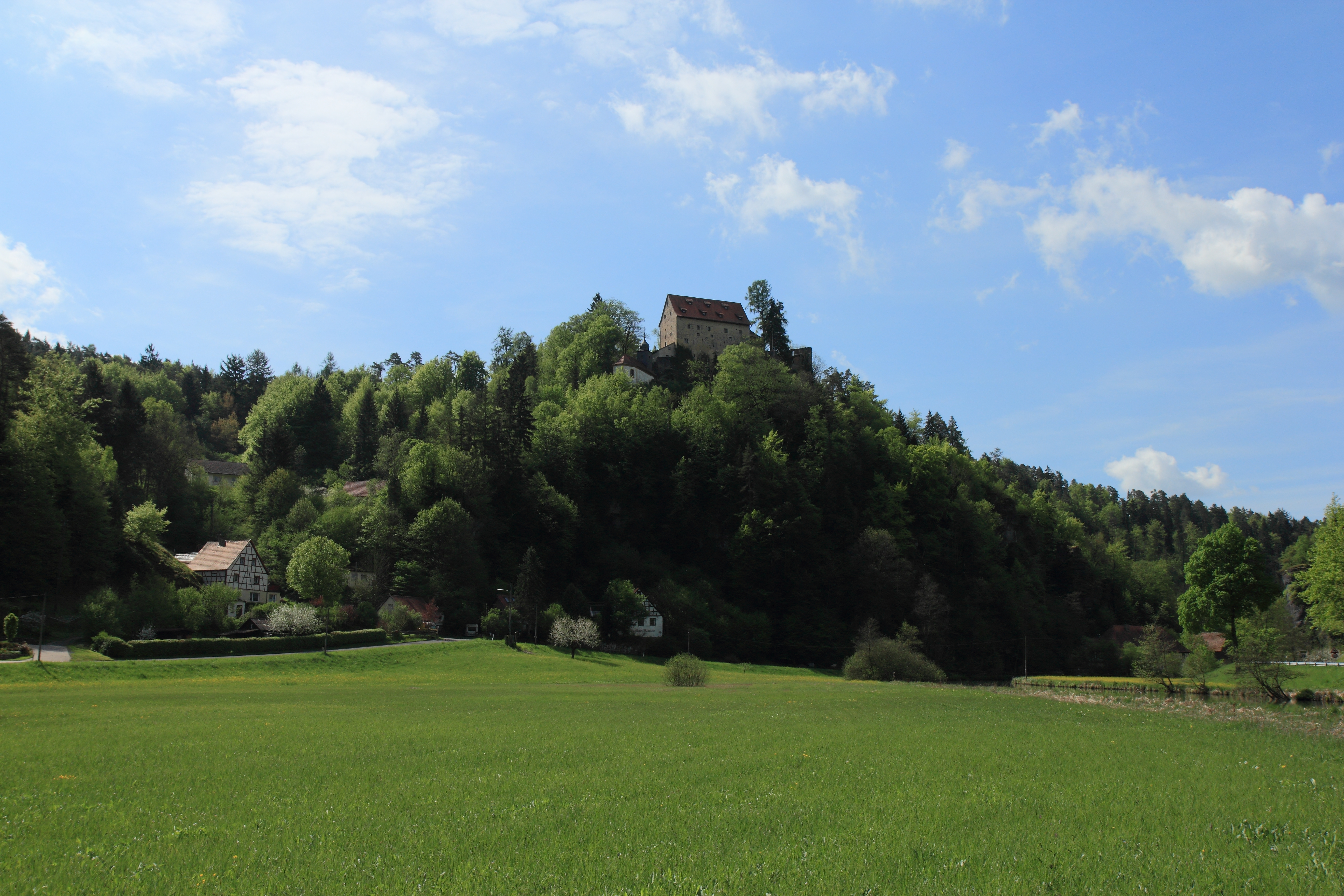 Burg Rabeneck - Ansicht des Burgberges mit der Burg aus nördlicher Richtung